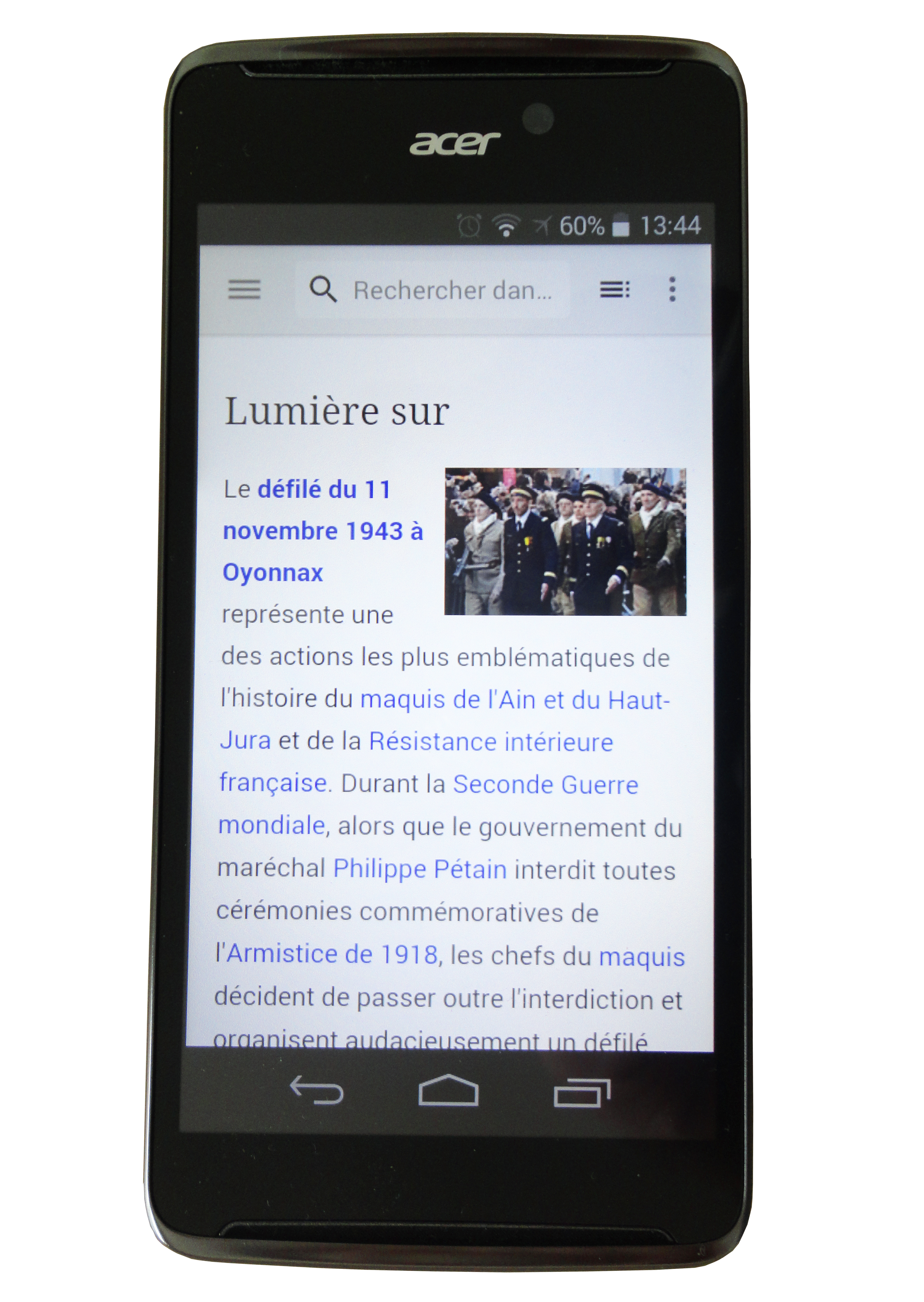 Acer Liquid E600 avec version mobile de wikipédia en français.